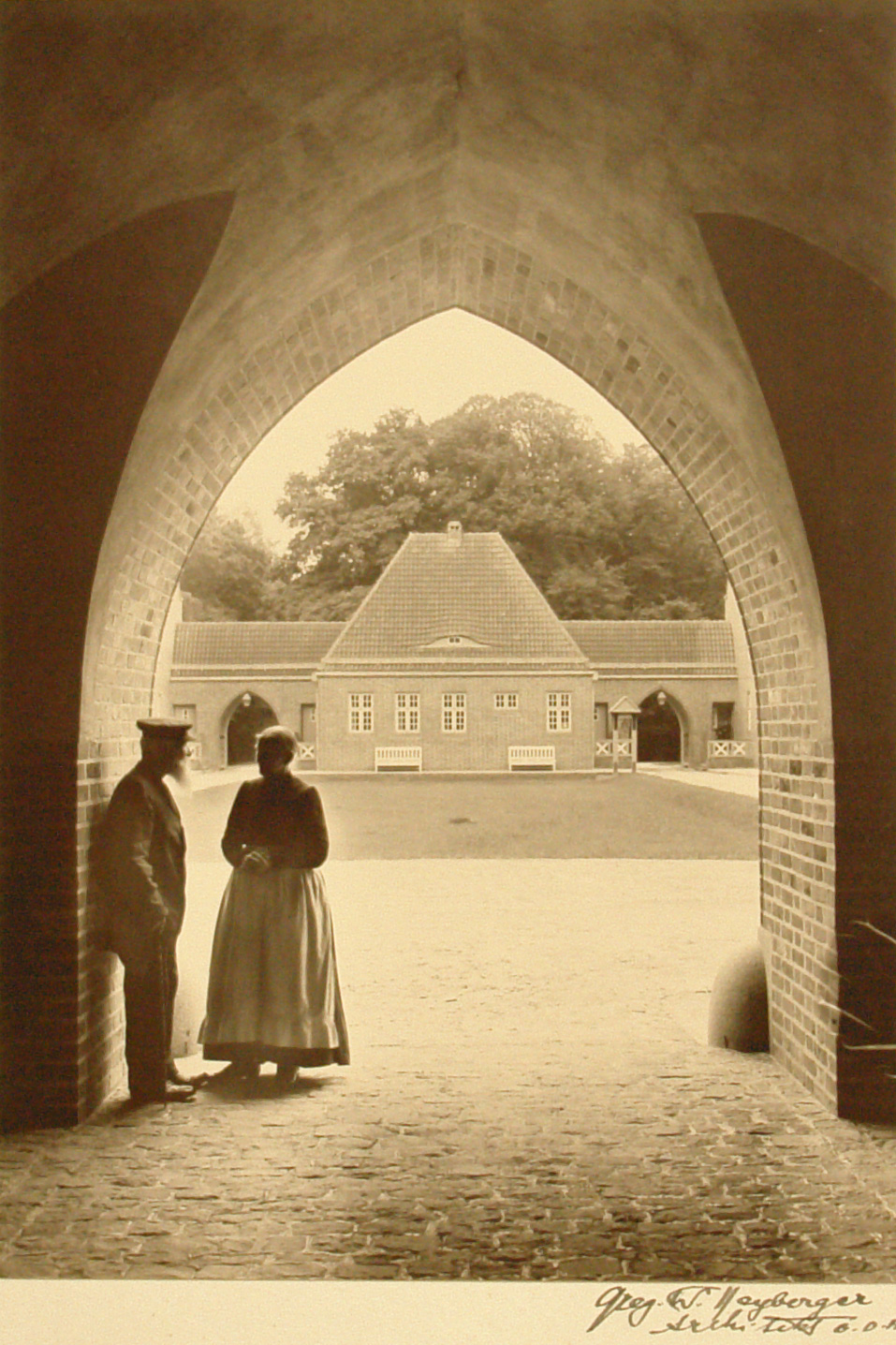 Egestorff-Stiftung in Bremen: Blick vom Haupthaus über den Rosenhof. Das Bild stammt aus einer Fotomappe mit der Goldprägung: ALTENHEIM IN TENEVER - Herrn Senator H. Hildebrand in Dankbarkeit gewidmet von dem Architekten Gregor Werner Heyberger (Quelle: Egestorff-Stiftung-Altenheim 2011)